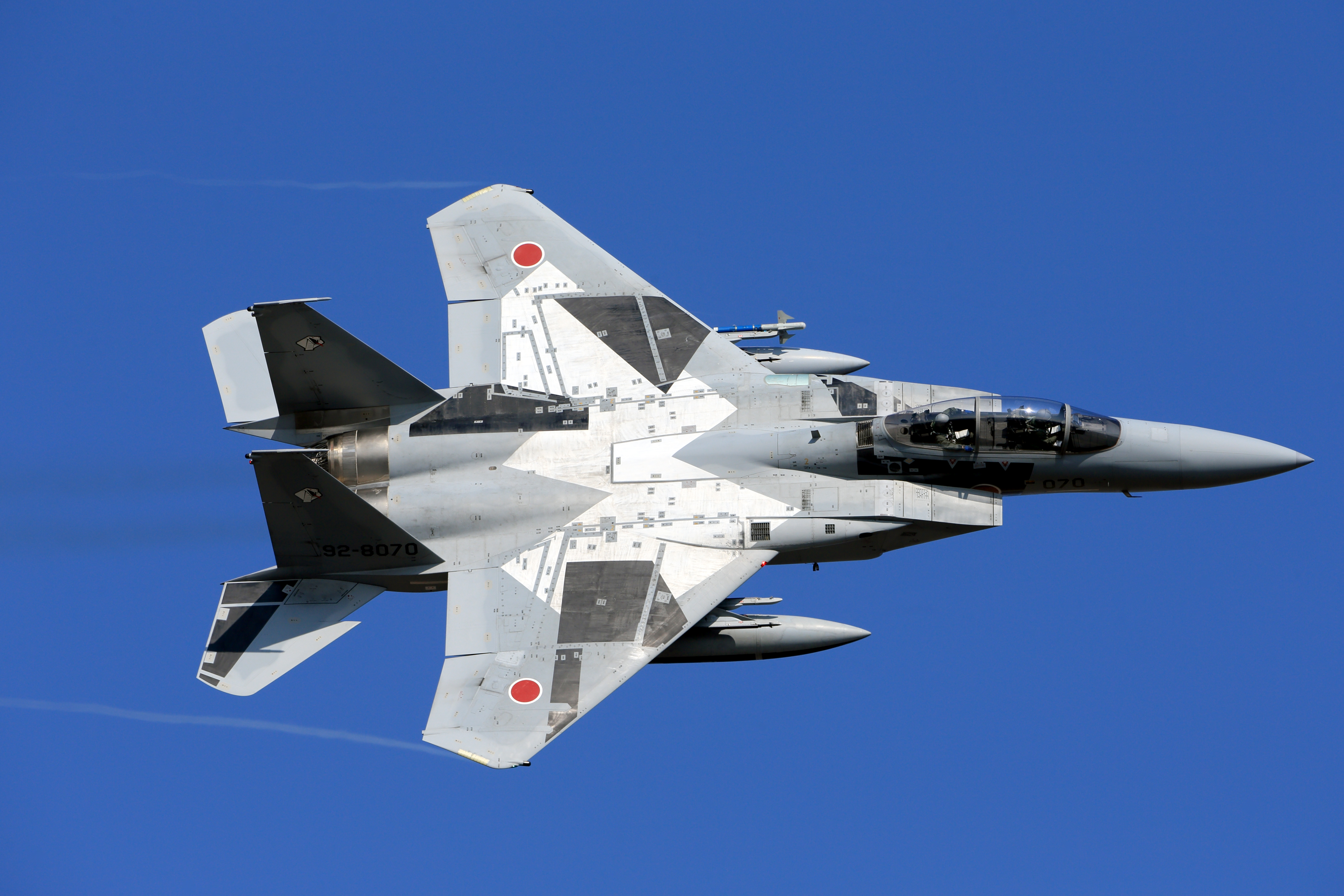 航空自衛隊百里基地で撮影された飛行教導群のF-15DJ